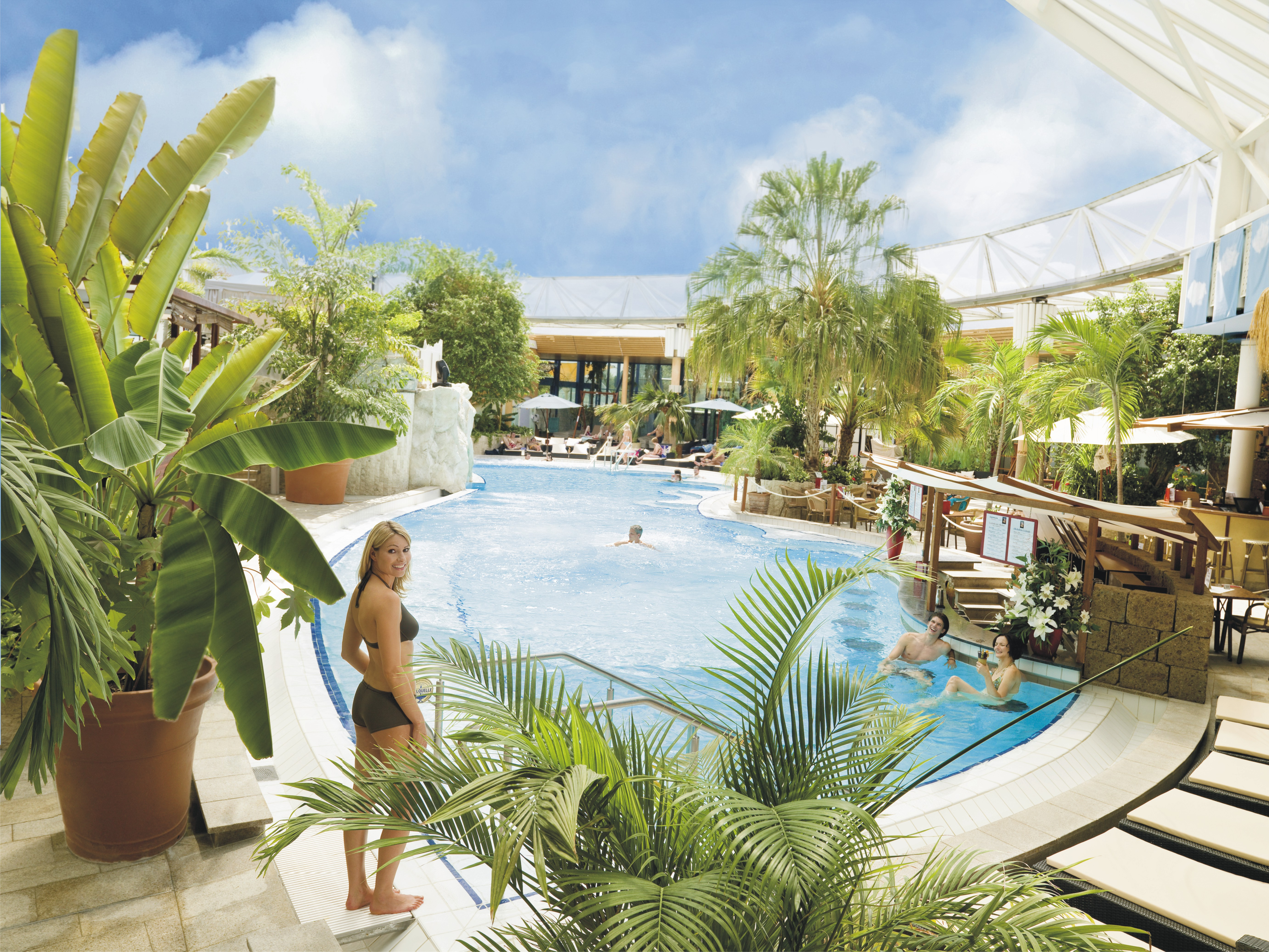 Blick in die VitalOase